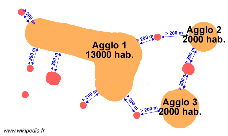 Schéma illustrant l'article sur la notion d'unités urbaines (1 sur 6)